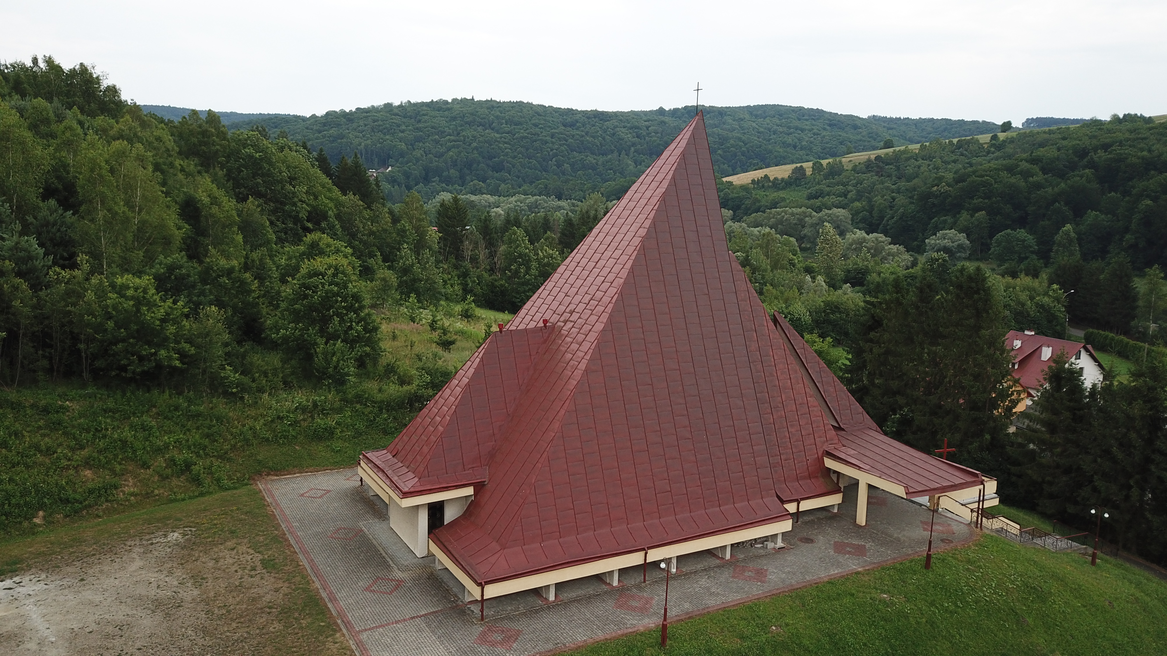 kościół Matki Boskiej Częstochowskiej w Słonnem, widok z lotu ptaka (z drona)